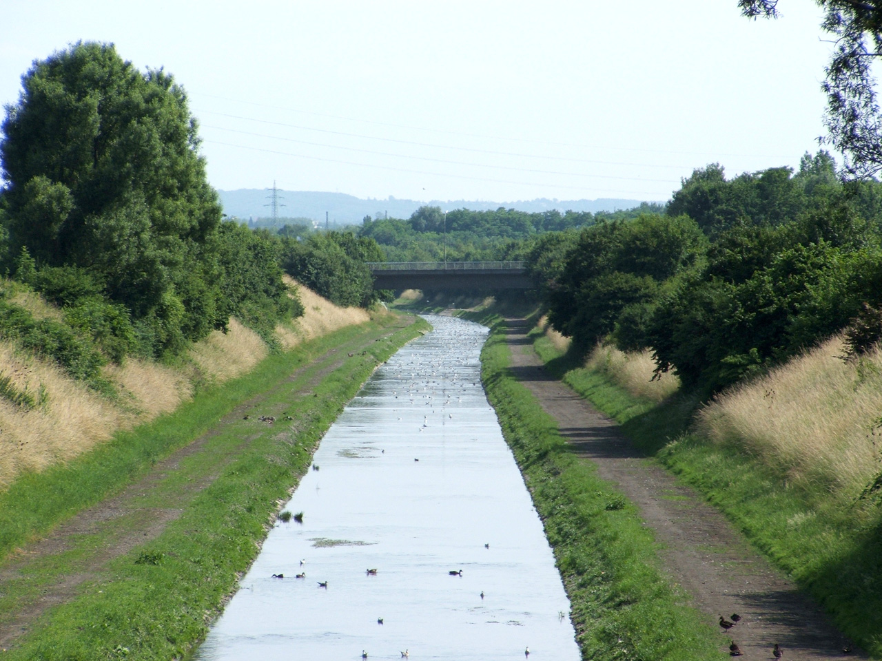 Beschreibung : Die Emscher bei Dortmund Deusen Fotograf : Gerd W. Schmölter Datum : 03. Juli 2005 Lizenz